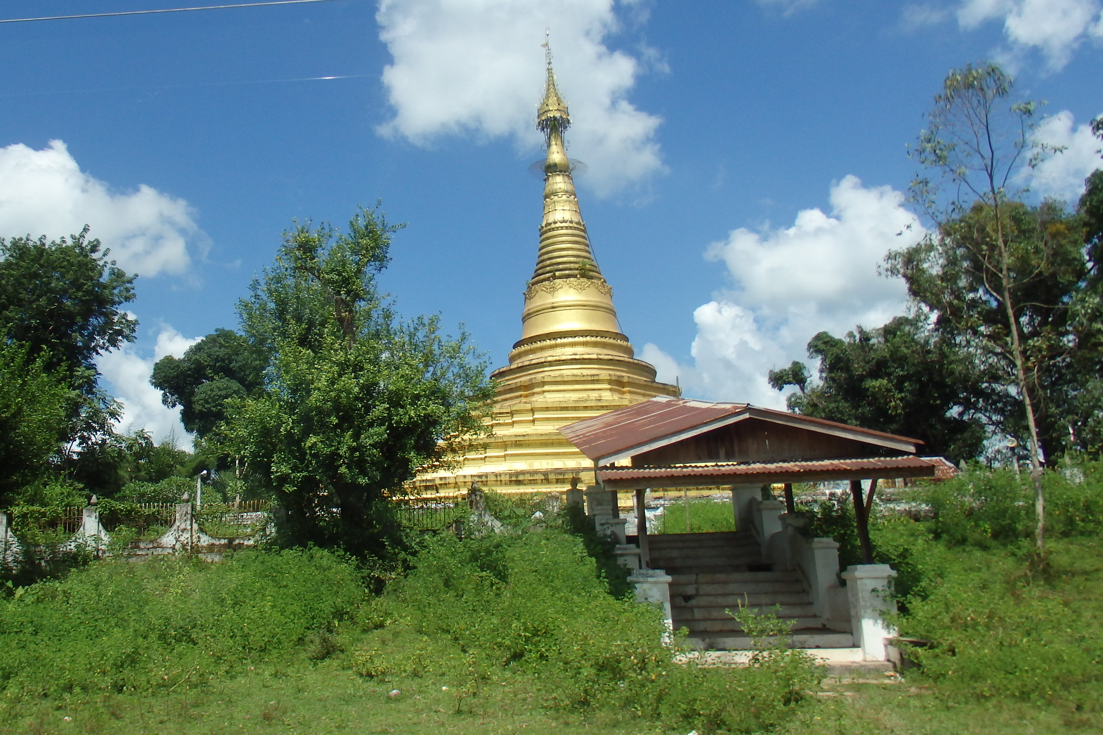 Myaungmya, Myanmar (Burma)